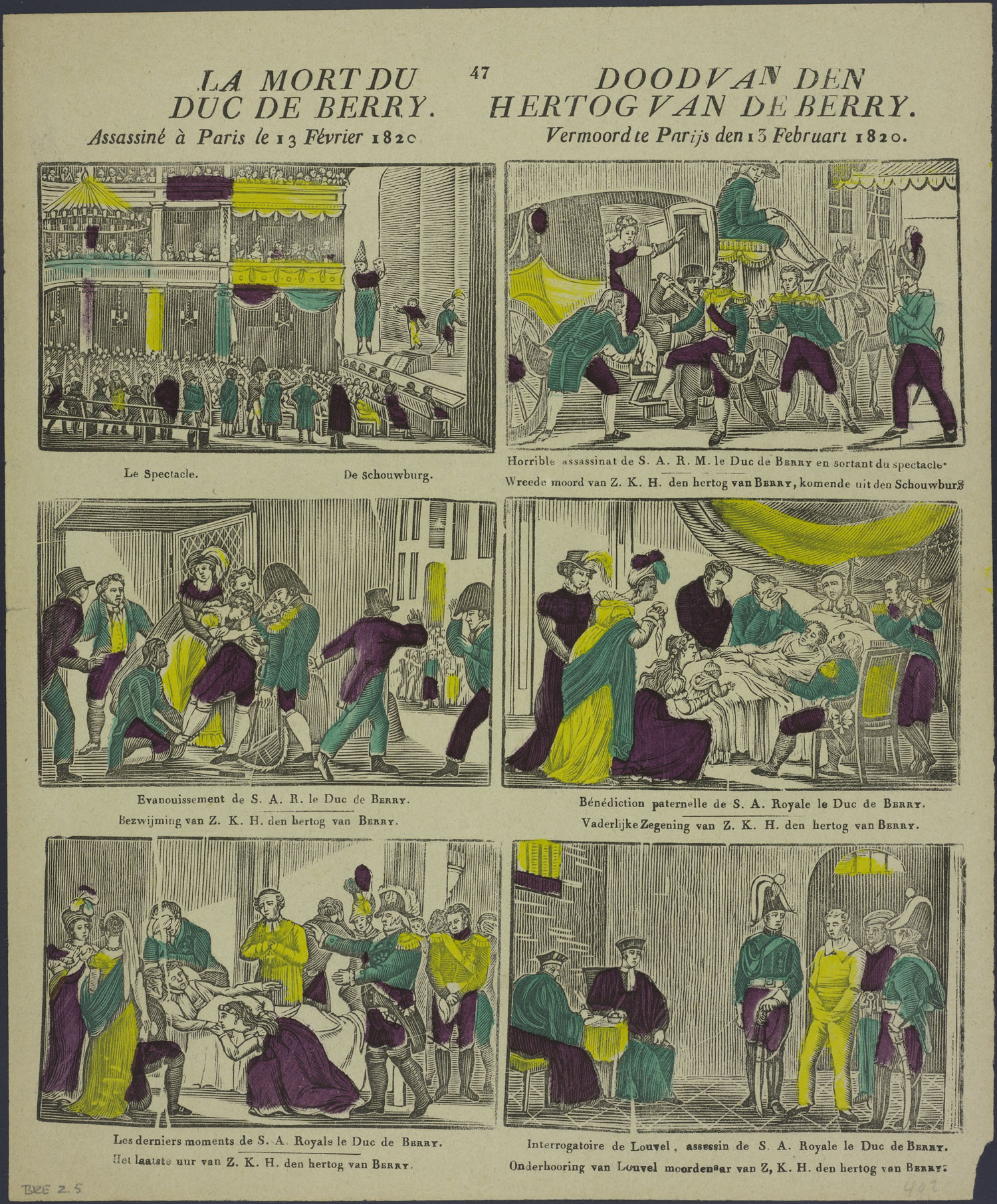 Centsprent met 3 x 2 omkaderde houtsneden, met gedetailleerde afbeeldingen van de moord op de hertog van Berry in Parijs op 13 februari 1820. Het begint met een afbeelding van een schouwburgzaal (in Parijs), dan de moord met een mes bij de koets na het verlaten van de schouwburg. Verder afbeeldingen van de hertog die bezwijmt, de vaderlijke zegen, zijn laatste uur, en de ondervraging van de moordenaar. Bevat eenregelige onderschriften in Frans en Nederlands.